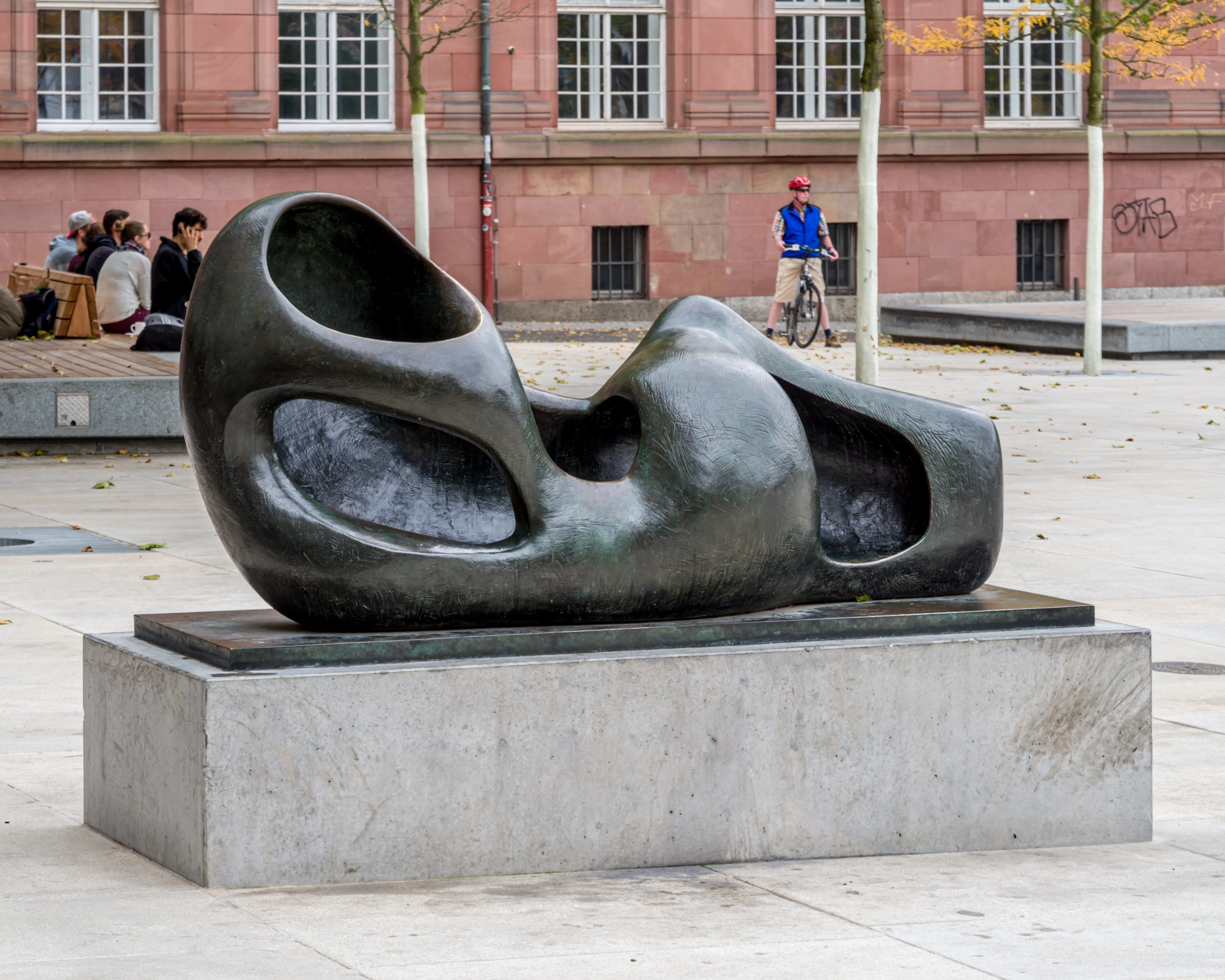 Bilder aus Freiburg im Breisgau. Hier Platz der Alten Synagoge Die Liegende, eine der Reclining Figurs: von Henry Moore (LH 299, Universität Freiburg)